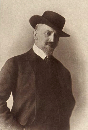 Franciszek Żmurko, Polish painter